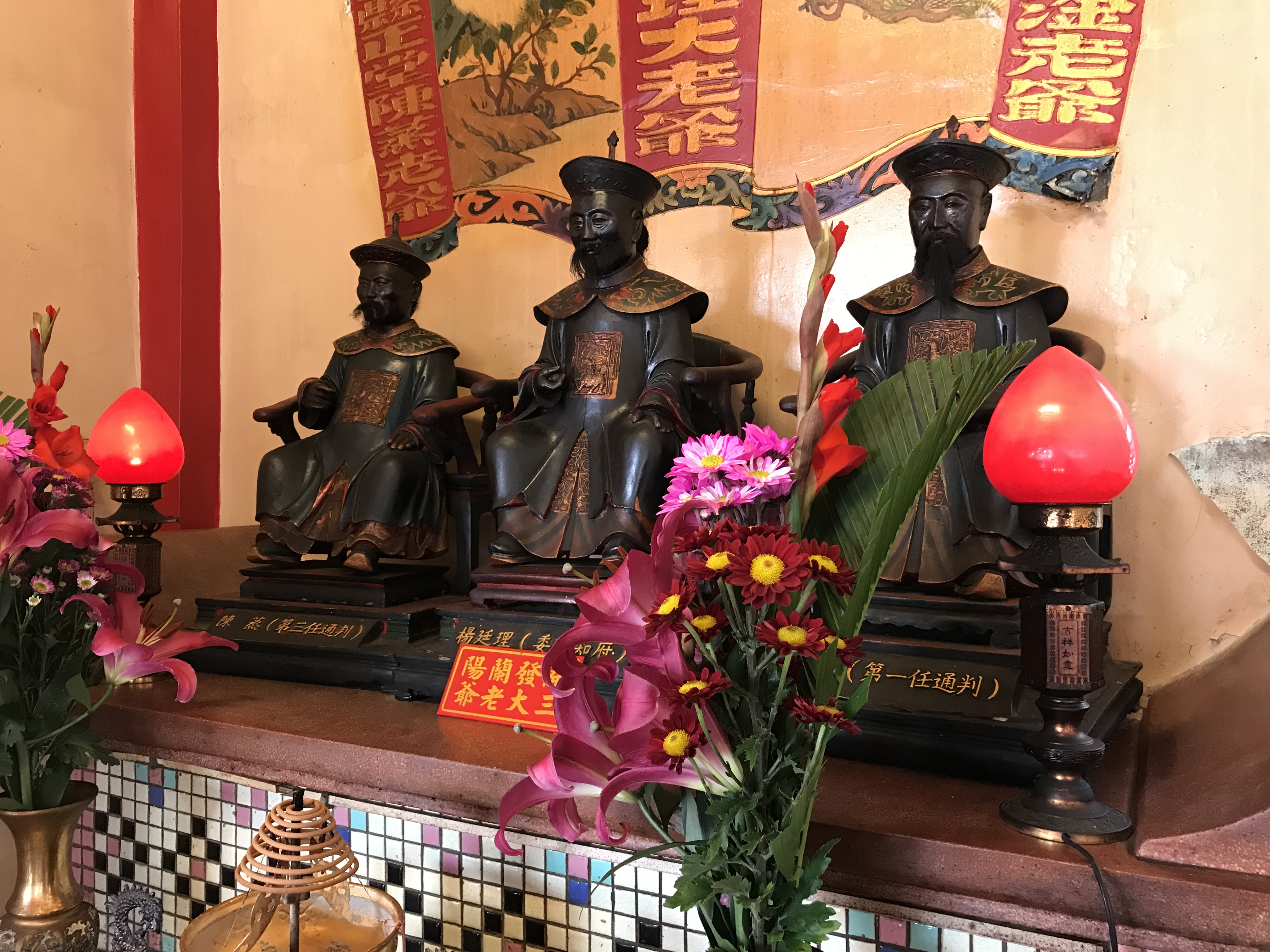 中文（台灣）: 昭應宮三大老神像